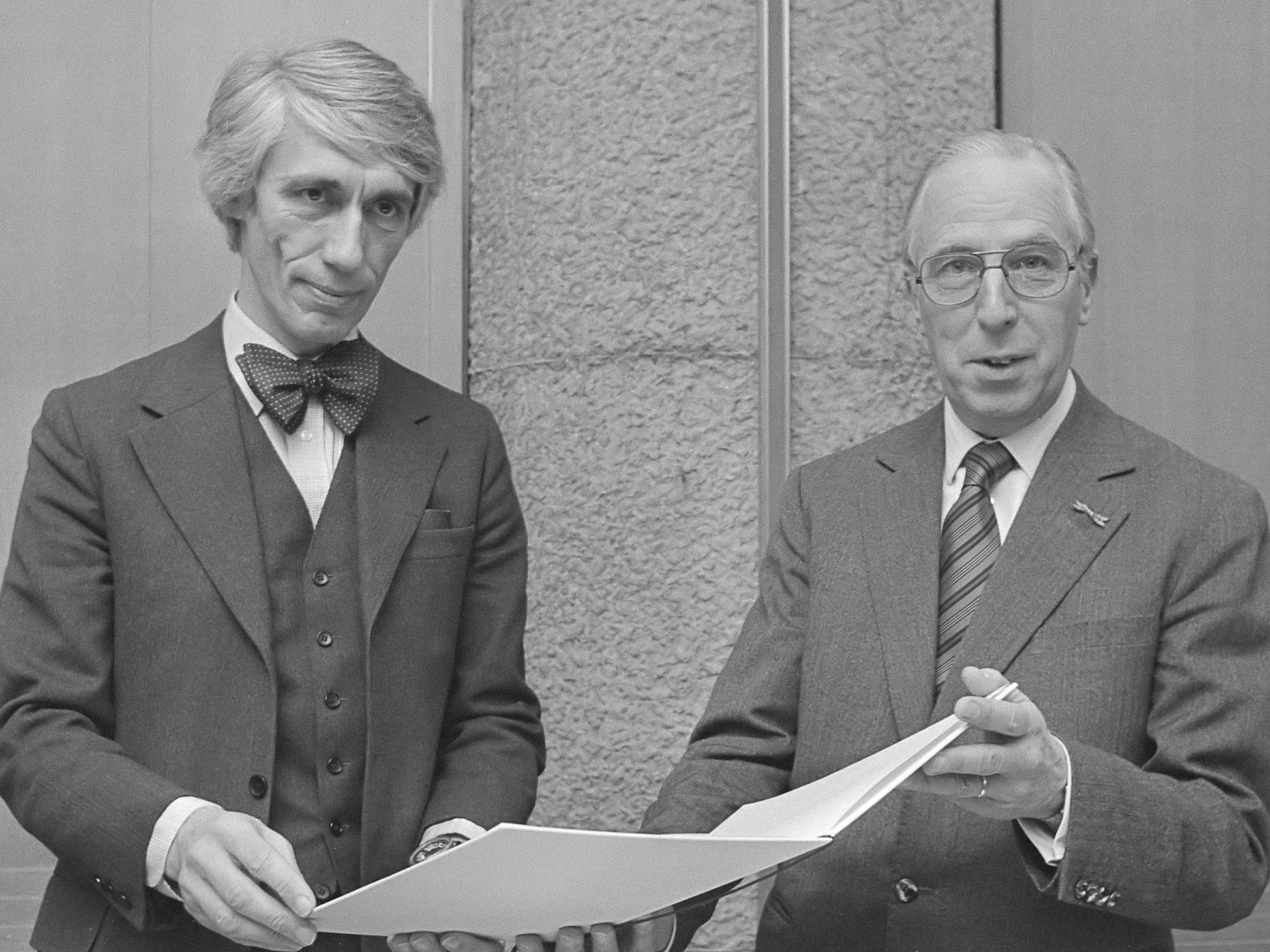 Uitreiking Willem Grollenbergprijs door E.G. Stijkel (voorziter Kamer van Koophandel) aan prof. Wim Crouwel (links) 23 november 1976